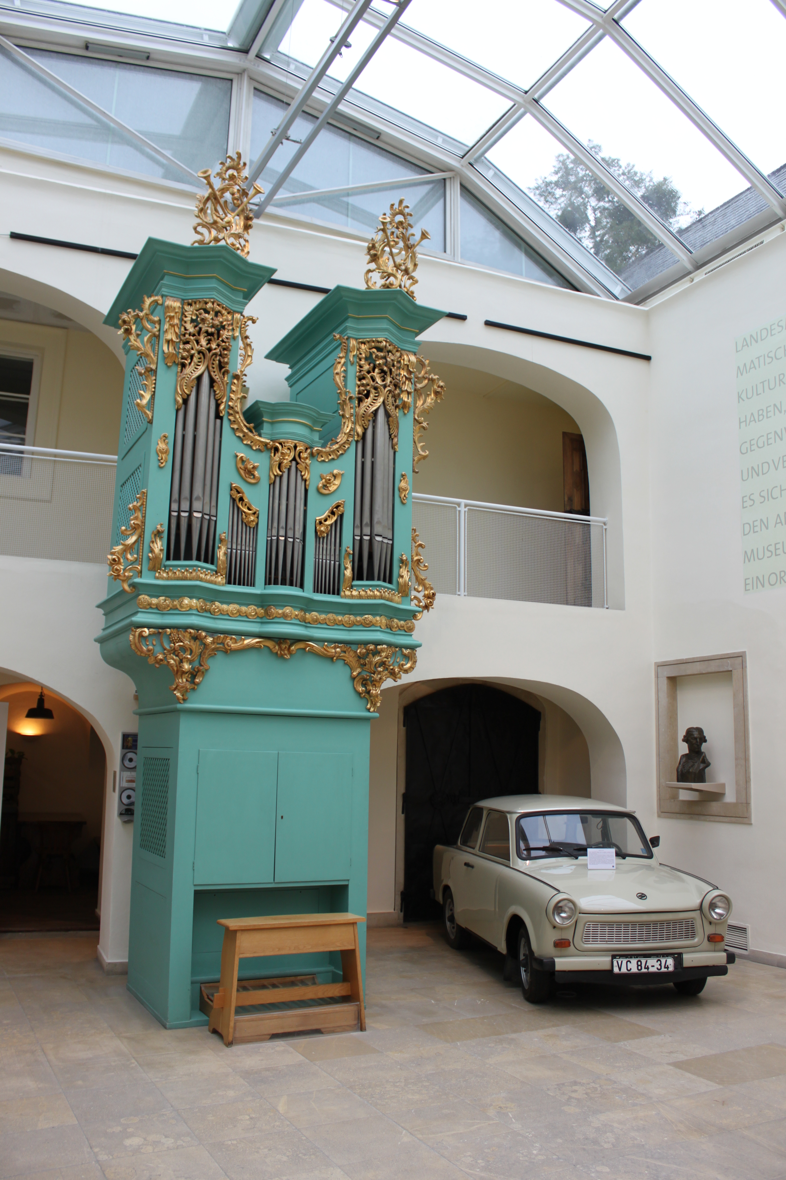 Landesmuseum, Innenhof überdacht